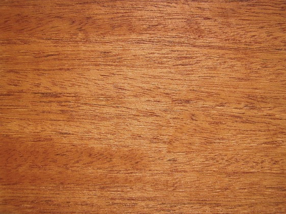 Gemessertes Furnier des amerikanischen Mahagonis (Swietenia macrophylla), geölt, nicht geschliffen